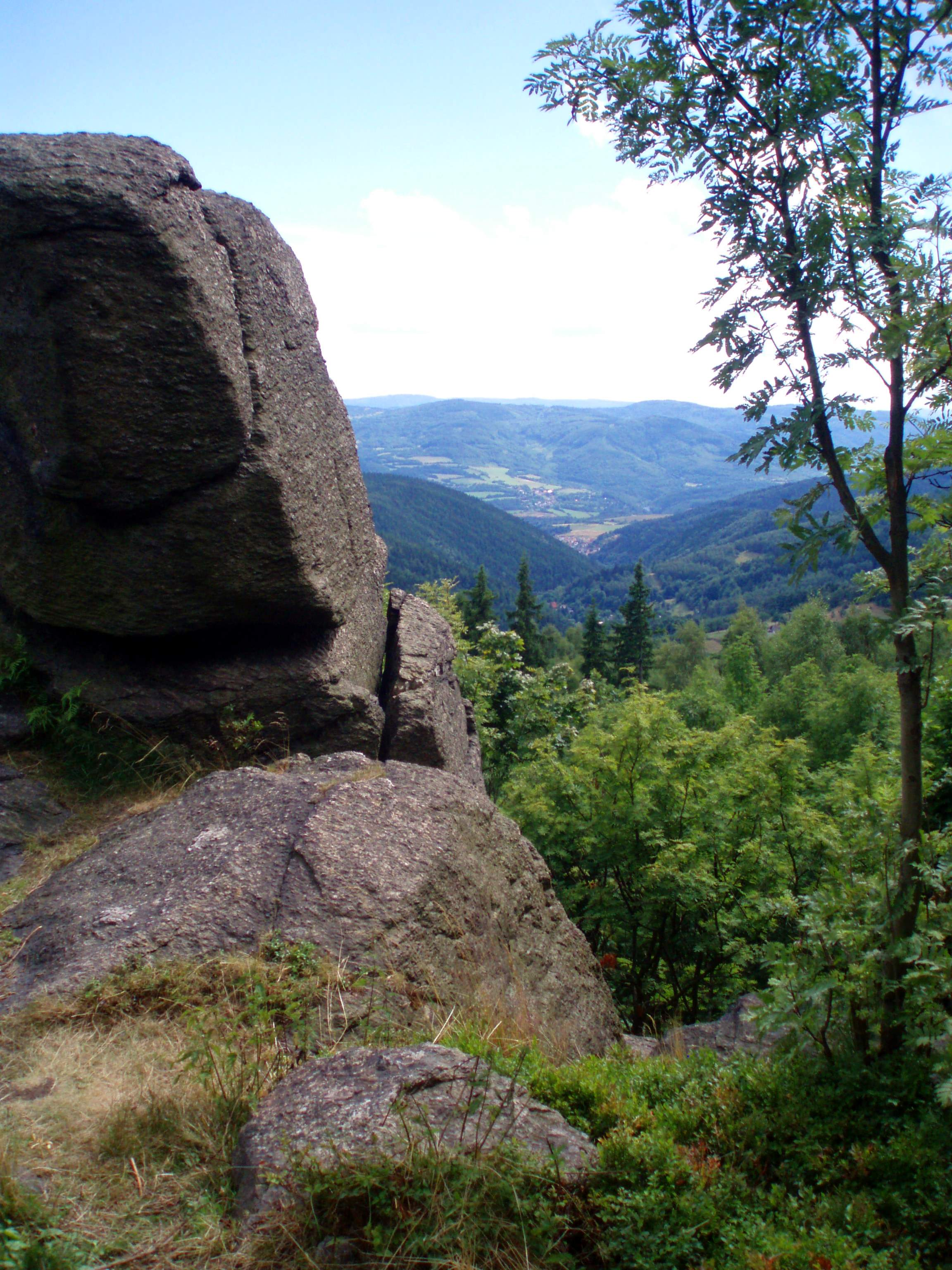 An der Sphinx